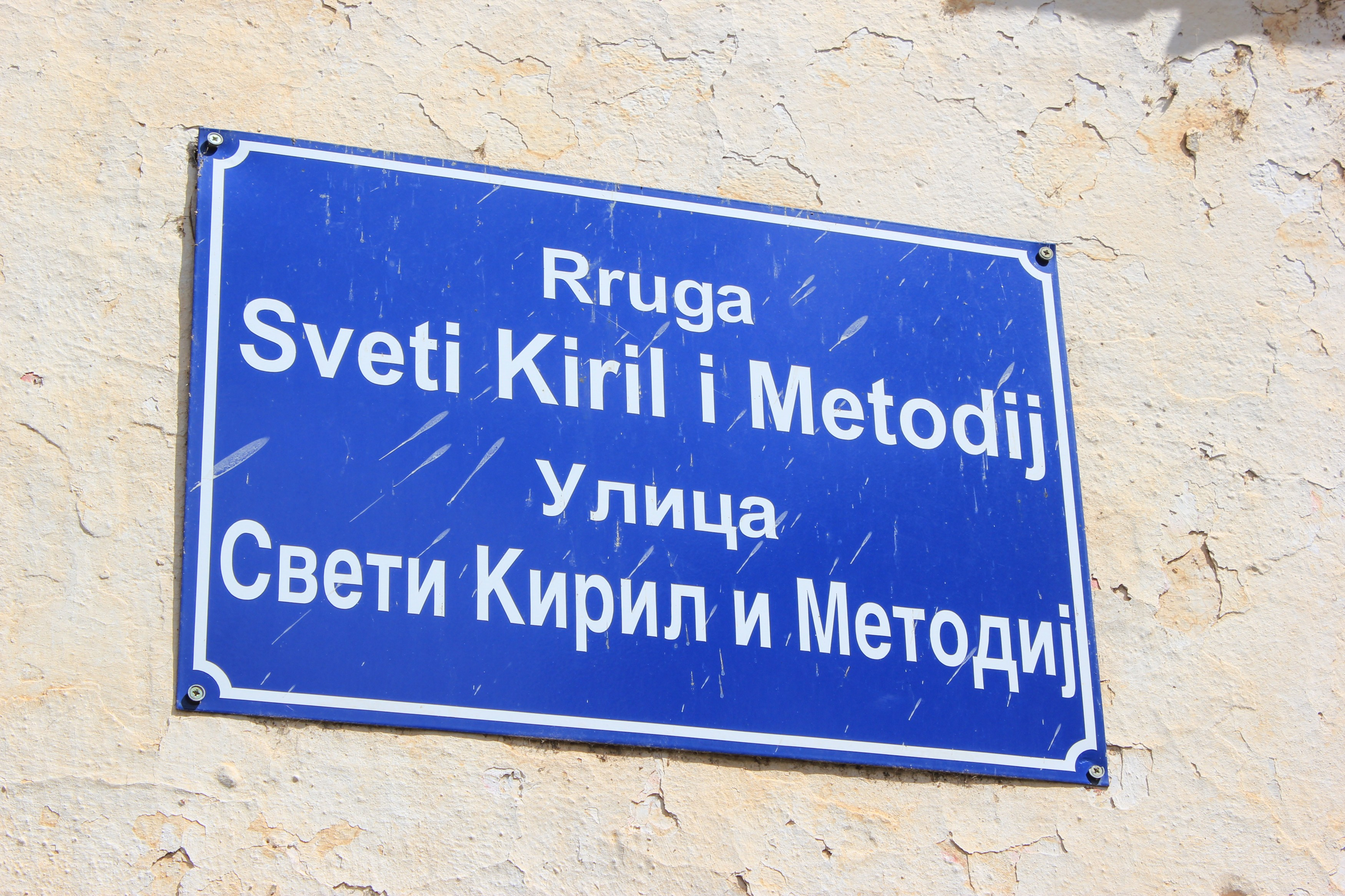 Zweisprachig mazedonisch-albanisches Schild in Dolna Gorica (Gorica e Vogel), Gemeinde Pustec, Albanien.